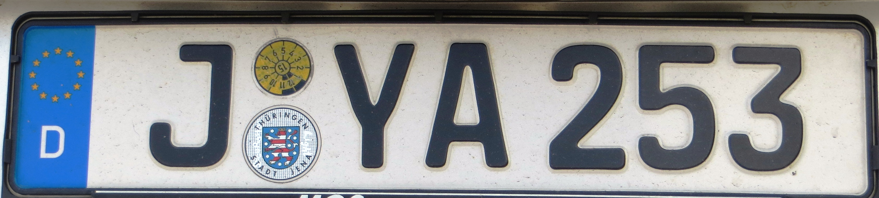 Kentekenplaat uit Jena